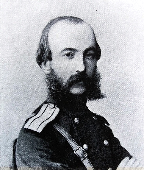 Бодиско, Константин Константинович